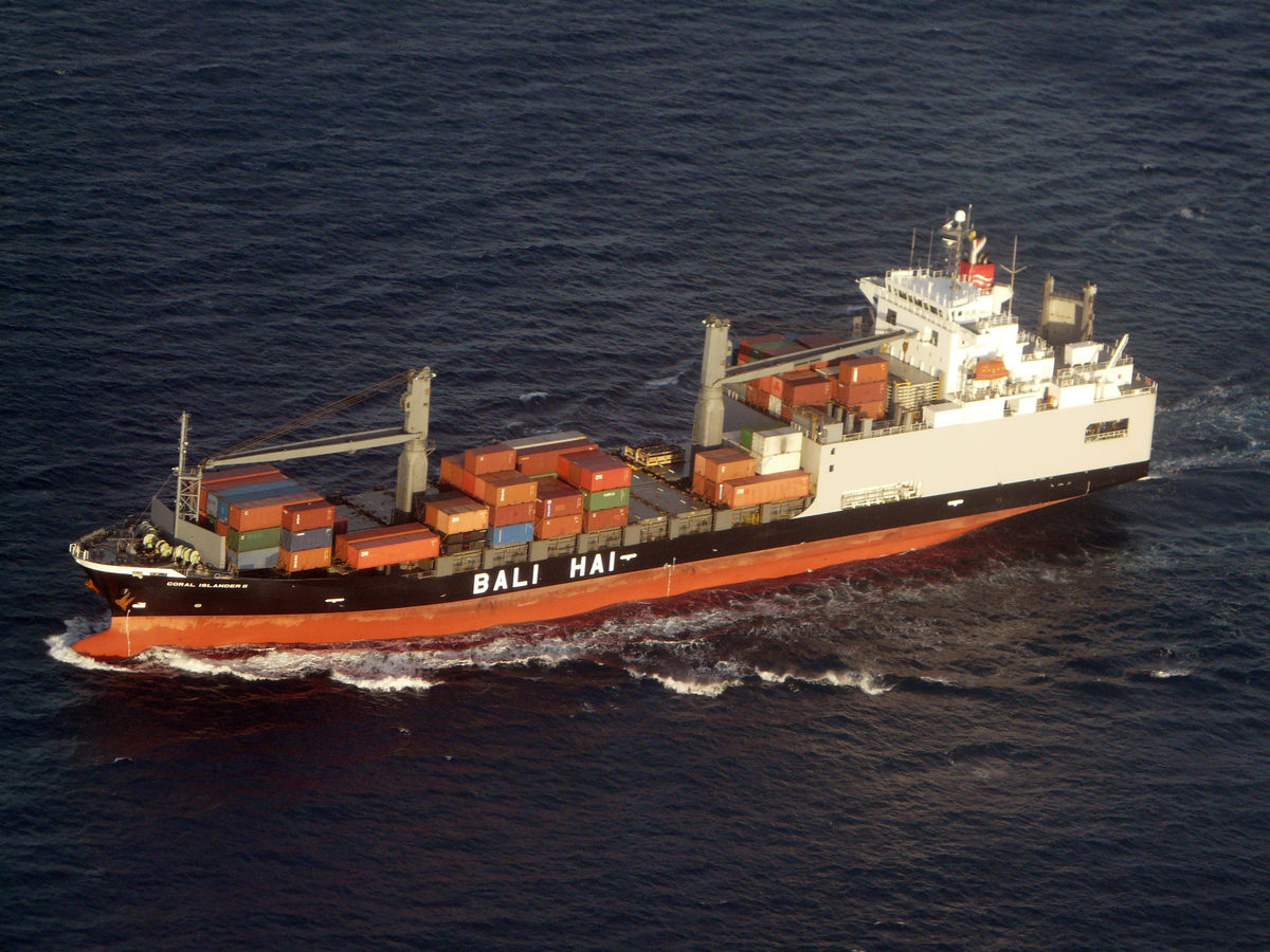 Vue aérienne sur le roulier "Coral Islander II", sous pavillon de Panama, à l'approche de la rade de Papeete, Tahiti.